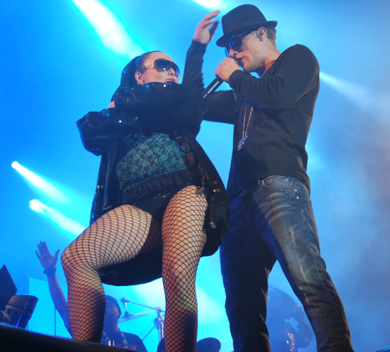 Niclas Petersen og danser, under Nik & Jay-koncert på Vig Festival 2010.